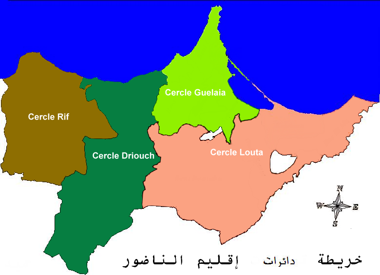 خريطة دائرات اقليم الناظور